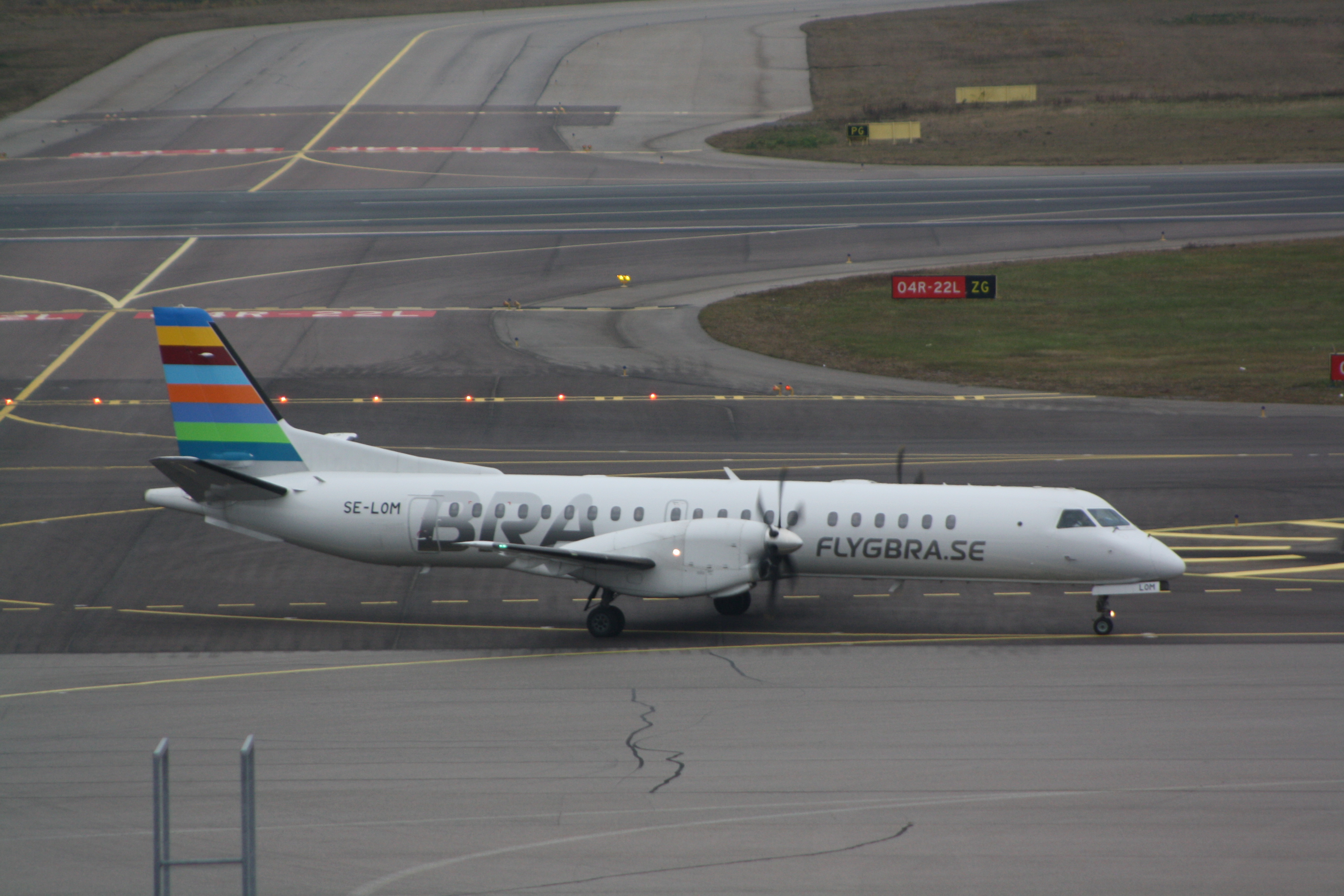 BRA at EFHK 2016